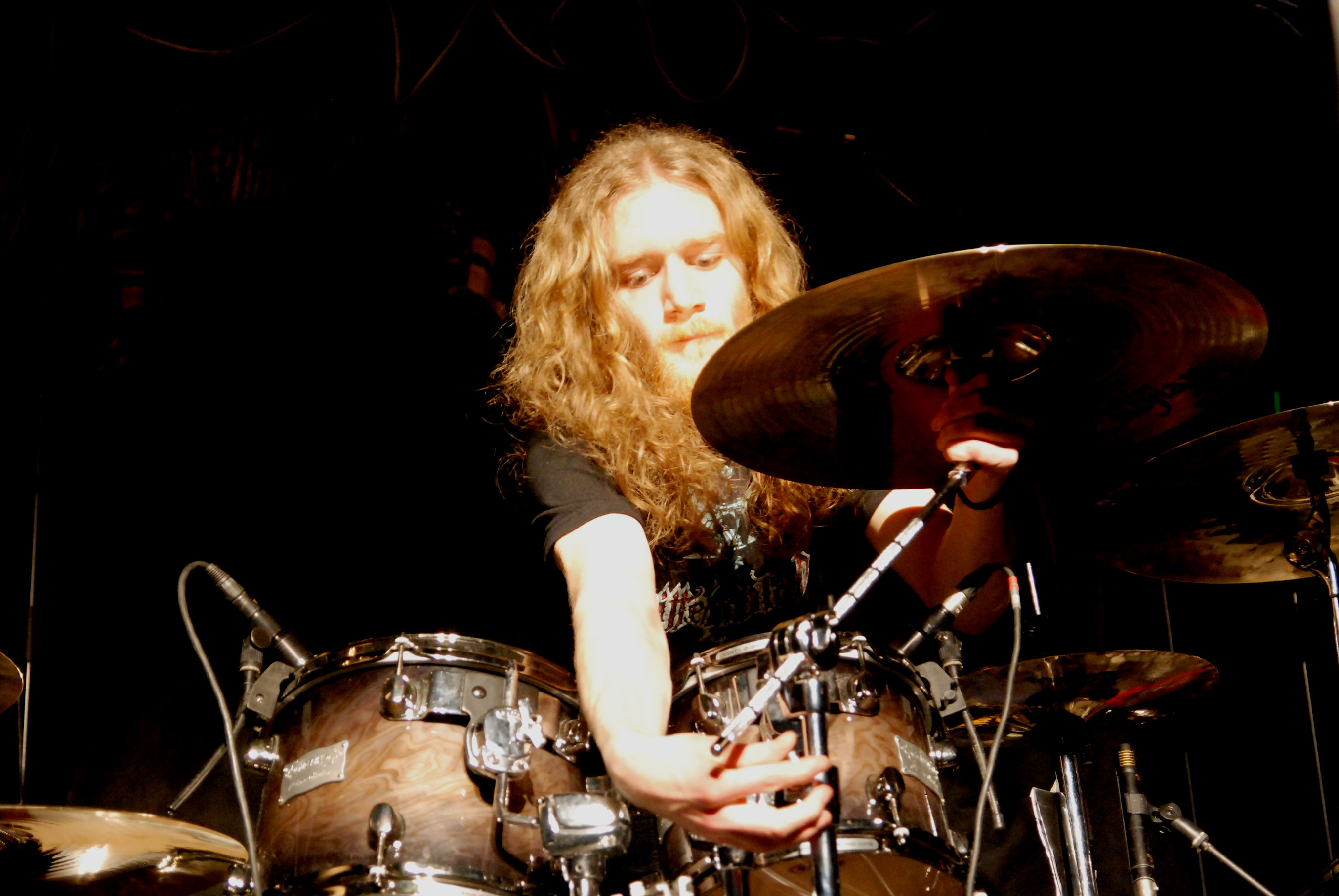 Eluveitie podczas koncertu w Klubie Studio w Krakowie